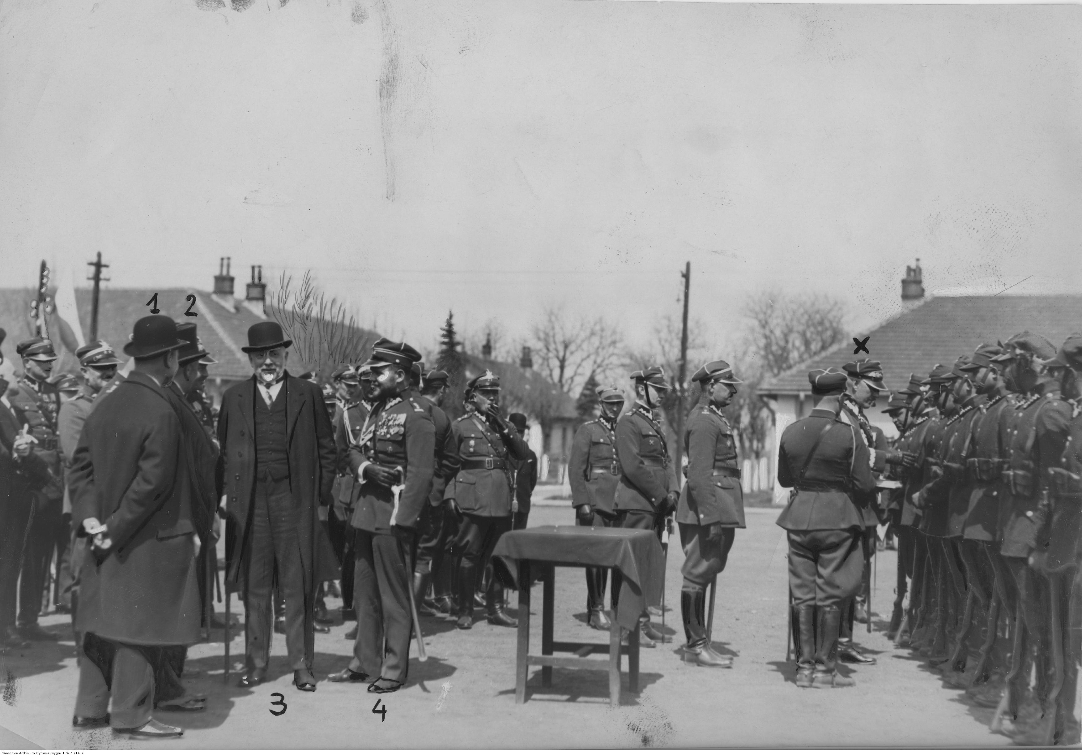 Święto 5 Batalionu Saperów w Krakowie. Rozdanie nagród drużynie ciesielskiej po międzykompanijnych zawodach ciesielskich. Nagrody rozdaje gen. Stanisław Wróblewski(x). Widoczni także m.in.: wojewoda krakowski Kazimierz Duch (1), minister poczt i telegrafów Ignacy Boerner (2), prezydent Karol Rolle (3), płk Marian Bolesławicz (4). Koncern Ilustrowany Kurier Codzienny - Archiwum Ilustracji. Sygnatura: 1-W-1714-7